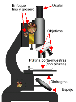 Schéma d'un microscope optique. Importé du wikipédia en langue anglaise. Dessiné par Theresa Knott, contributrice du wiki anglais, le 27 mars 2003 à 15h43 (UTC), avec l'outil de dessin de Microsoft Word et Paint Shop Pro. Corrigé par Héron avec Paint Shop Pro. Traduit en français par Cdang 22 jan 2004 à 16:44 (CET) avec Paint Shop Pro.